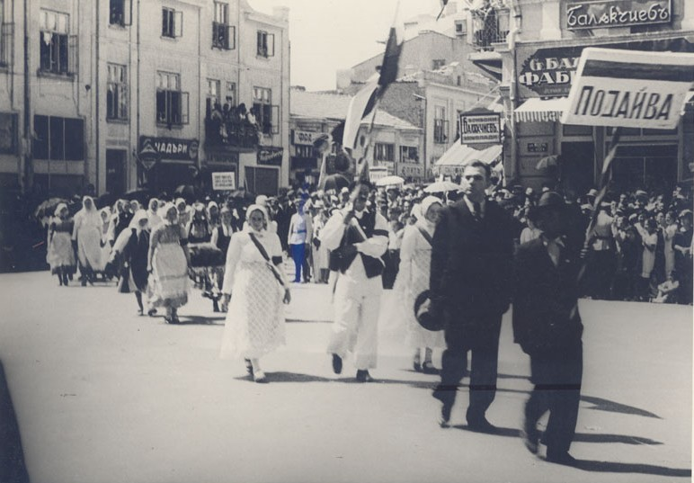 4-ти селскостопански културен и национален събор, 28 - 29 август 1938 г., гр. Варна. Парад на участниците в събора по ул. Княз Борис І. На преден план са представителите на село Подайва, Разградско.